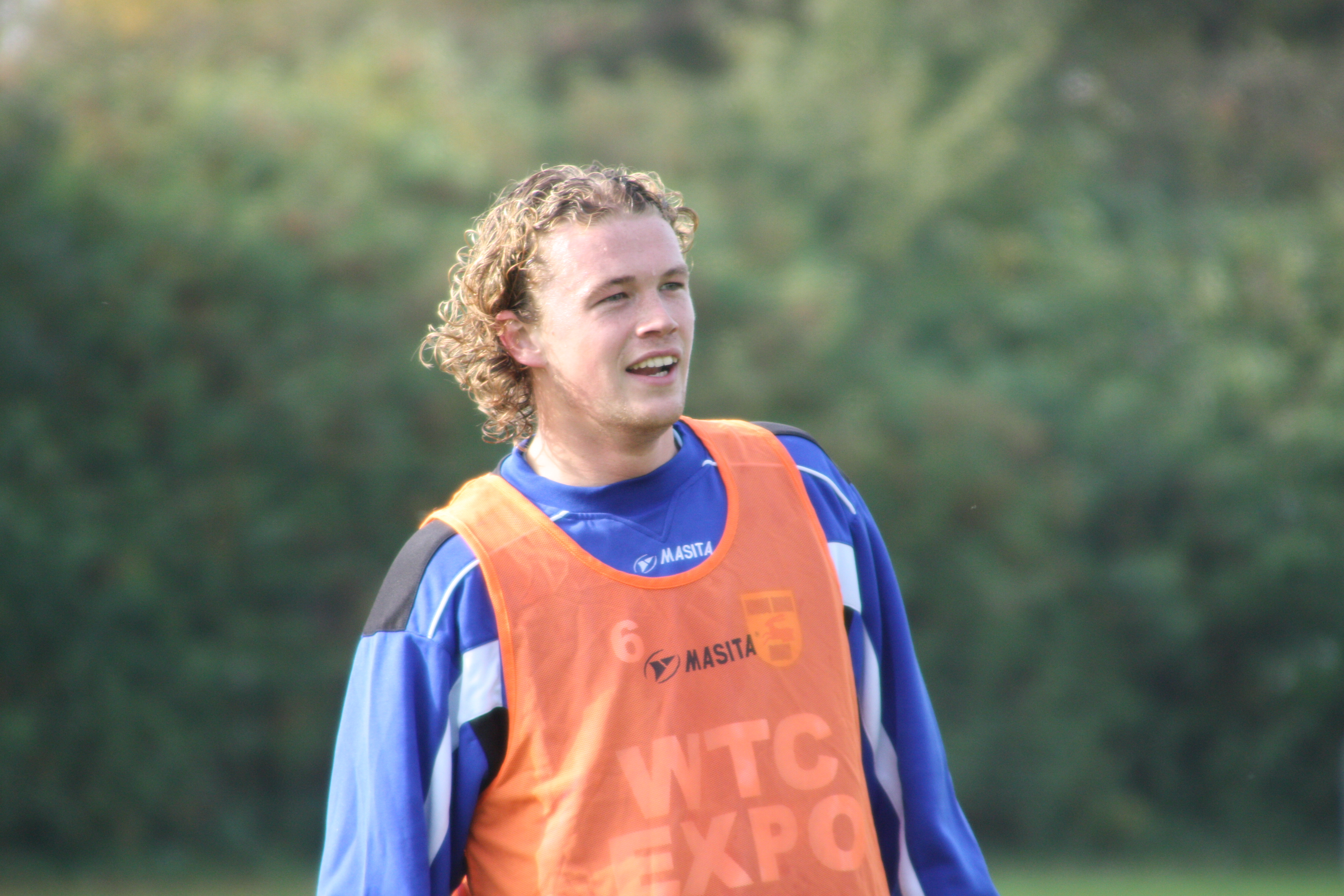 Paul Beekmans (Vught, 3 januari 1982) is een Nederlandse voetballer uitkomend voor Willem II.